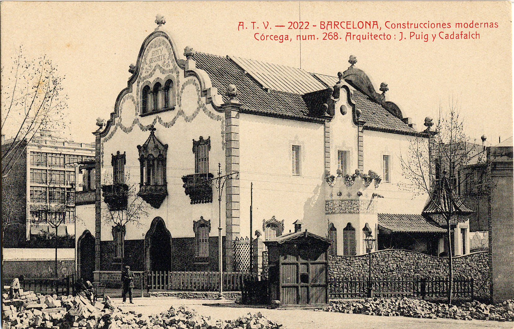 Casa Trinxet (1904). Obra de Josep Puig i Cadafalch, estava al C/ Còrcega, 268. Destruida en 1966. El pintor Joaquim Mir va fer-hi murals.